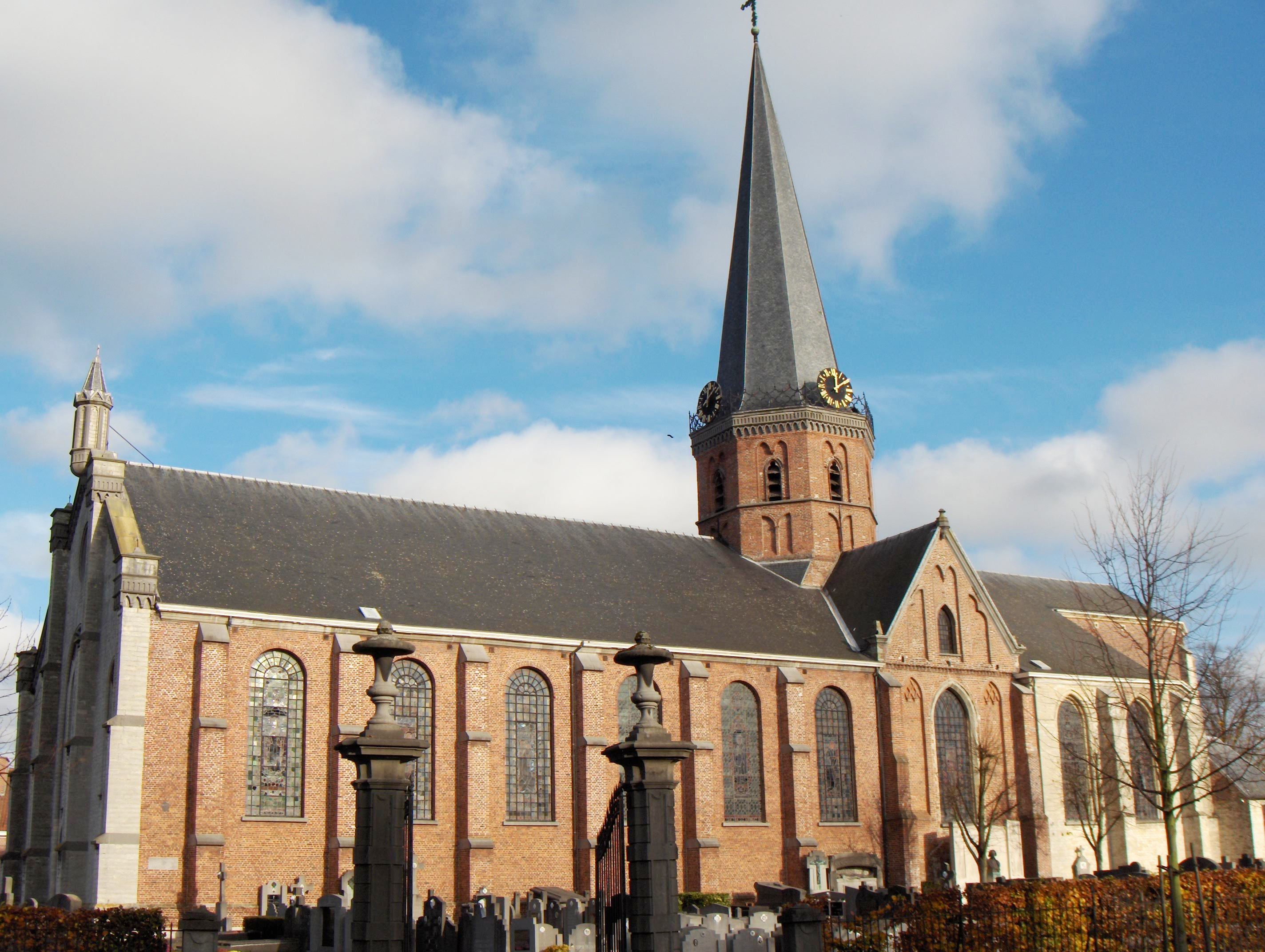 Sinaai (Ortsteil der Stadtgemeinde Sint-Niklaas, Belgien, Prov. Ostflandern), Katharinakirche.